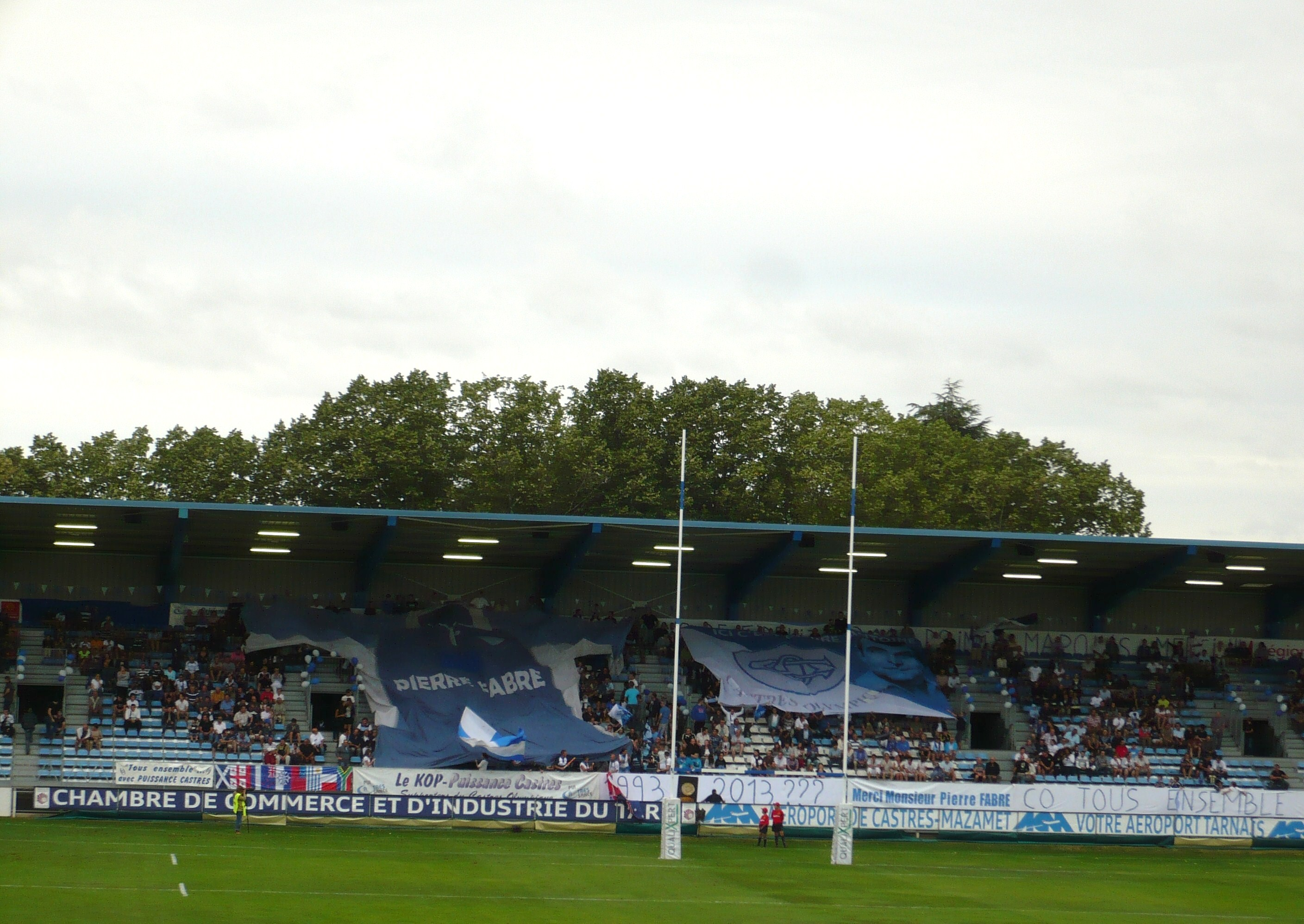 Stade Pierre-Antoine à Castres dans le département français du Tarn : tribune Nord.